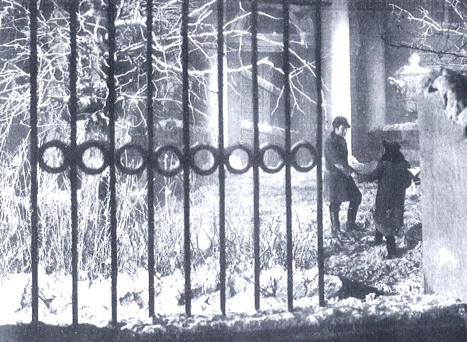 scena del film "Noi vivi addio kira" (Alessandrini 1942)